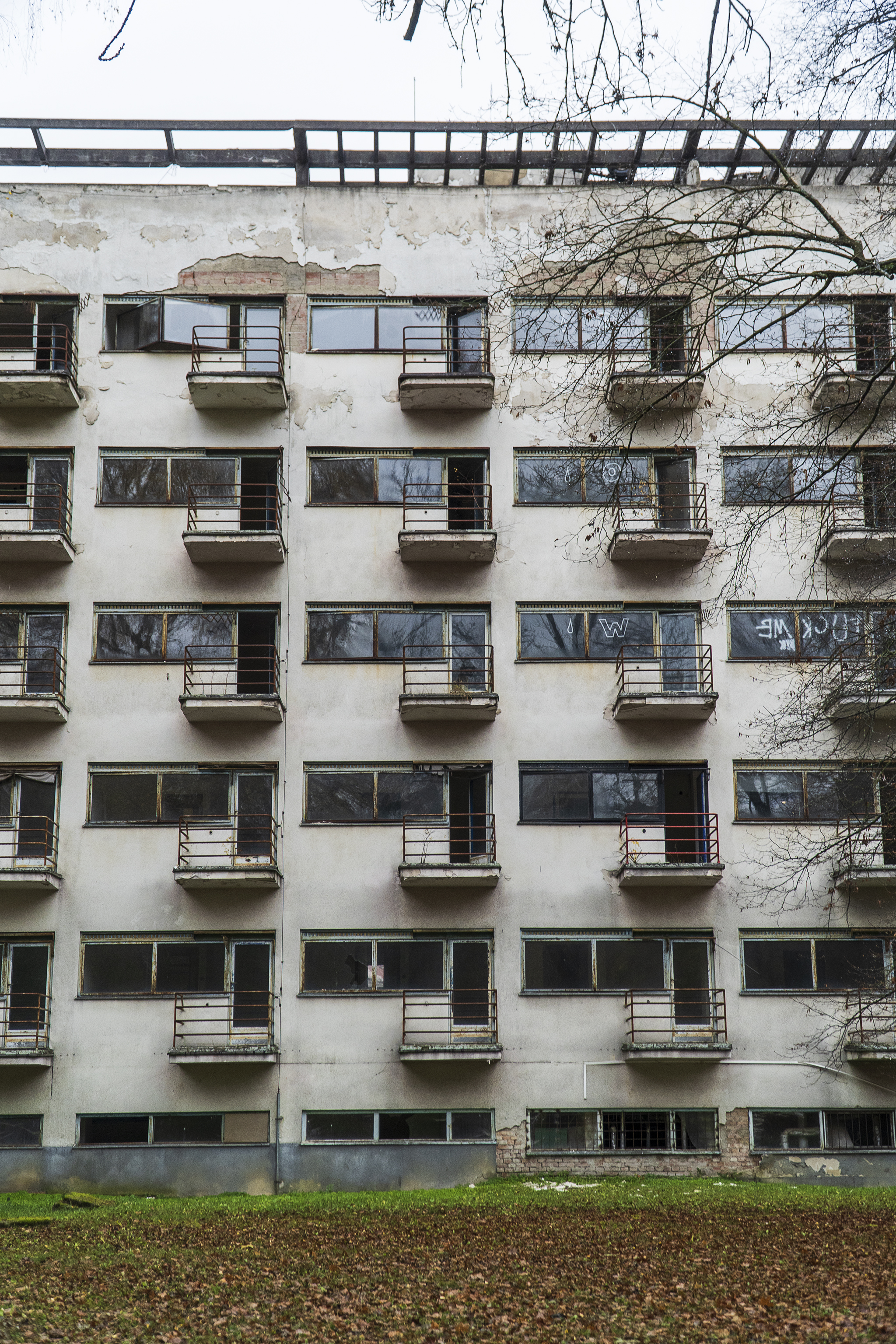 Liečebný dom Machnáč v Trenčianskych Tepliciach